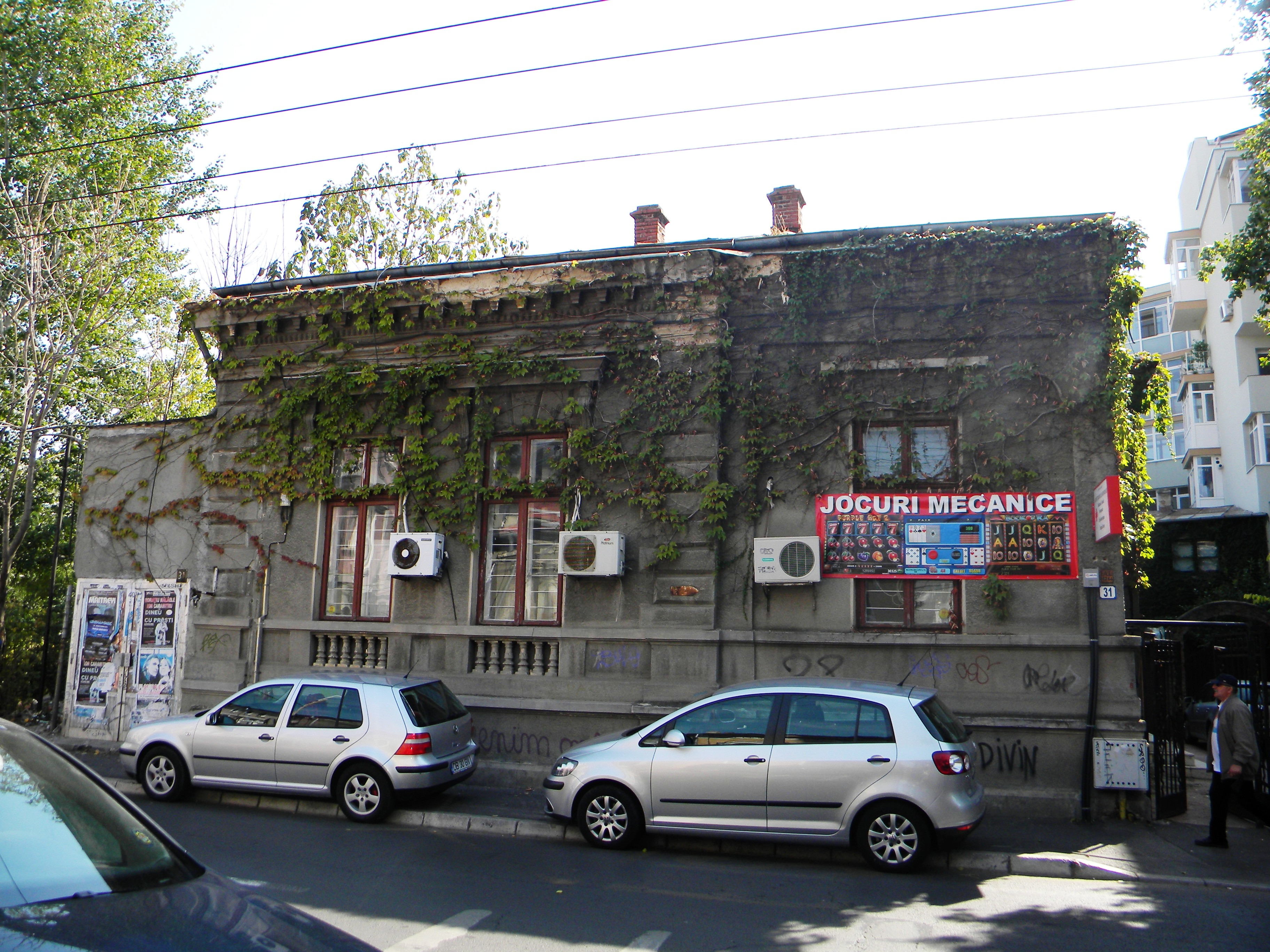 Bucuresti, Romania, Casa Theodor Rogalschi pe Str. Ghe Manu nr. 31, sect. 1